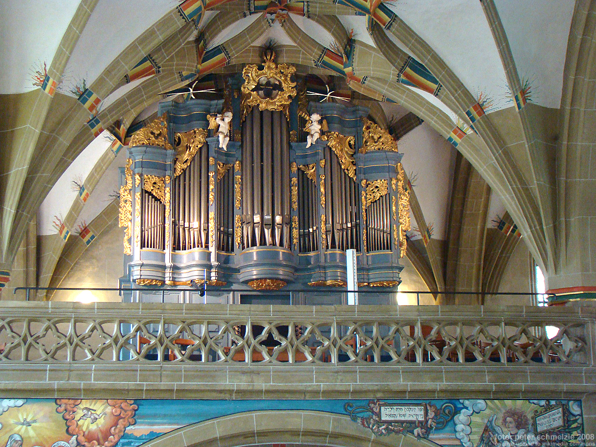 Kirchenorgel der Stadtkirche Bad Wimpfen